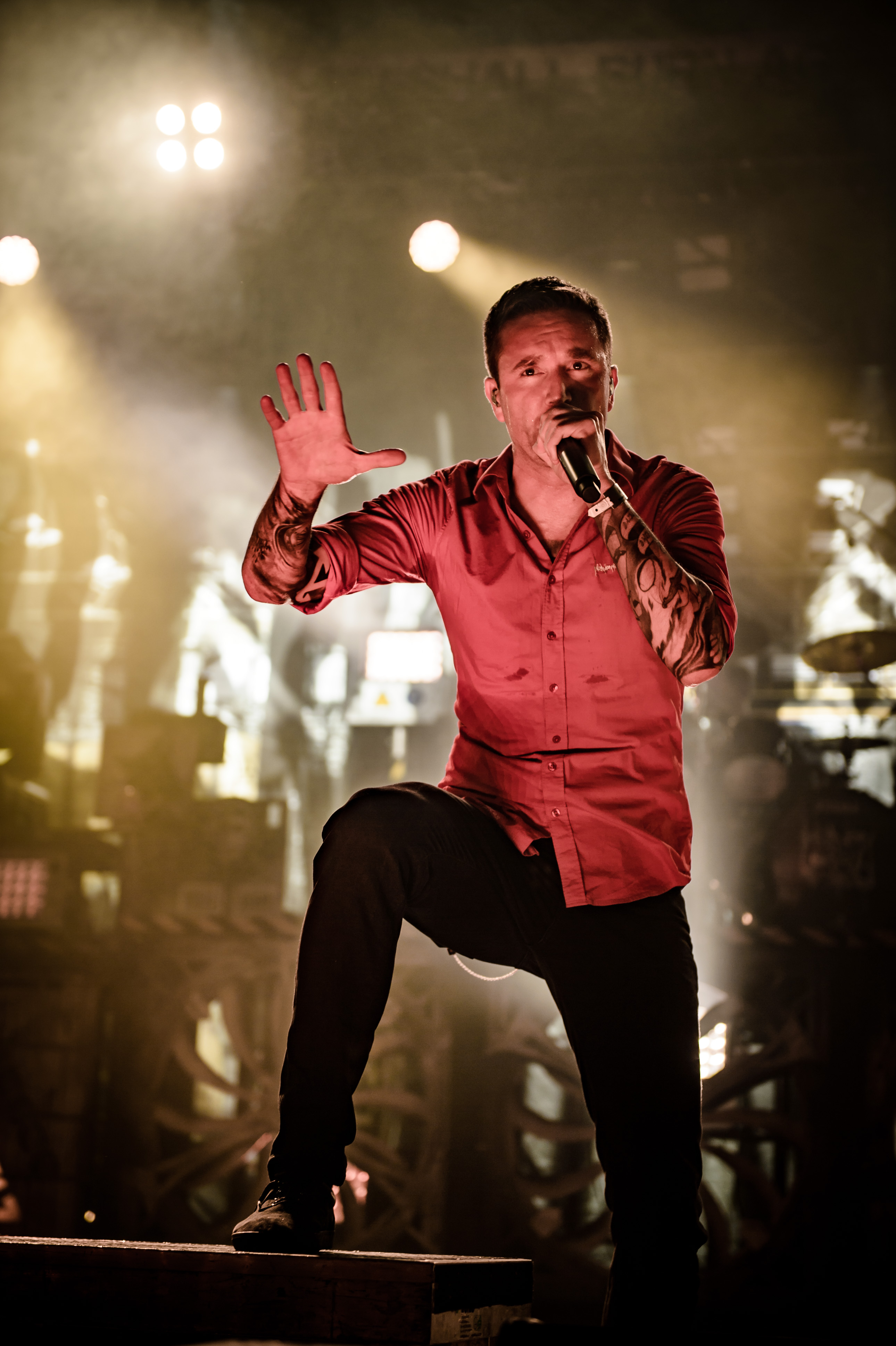 'Impericon Festival 2018; Turbinenhalle Oberhausen': 'Heaven Shall Burn'